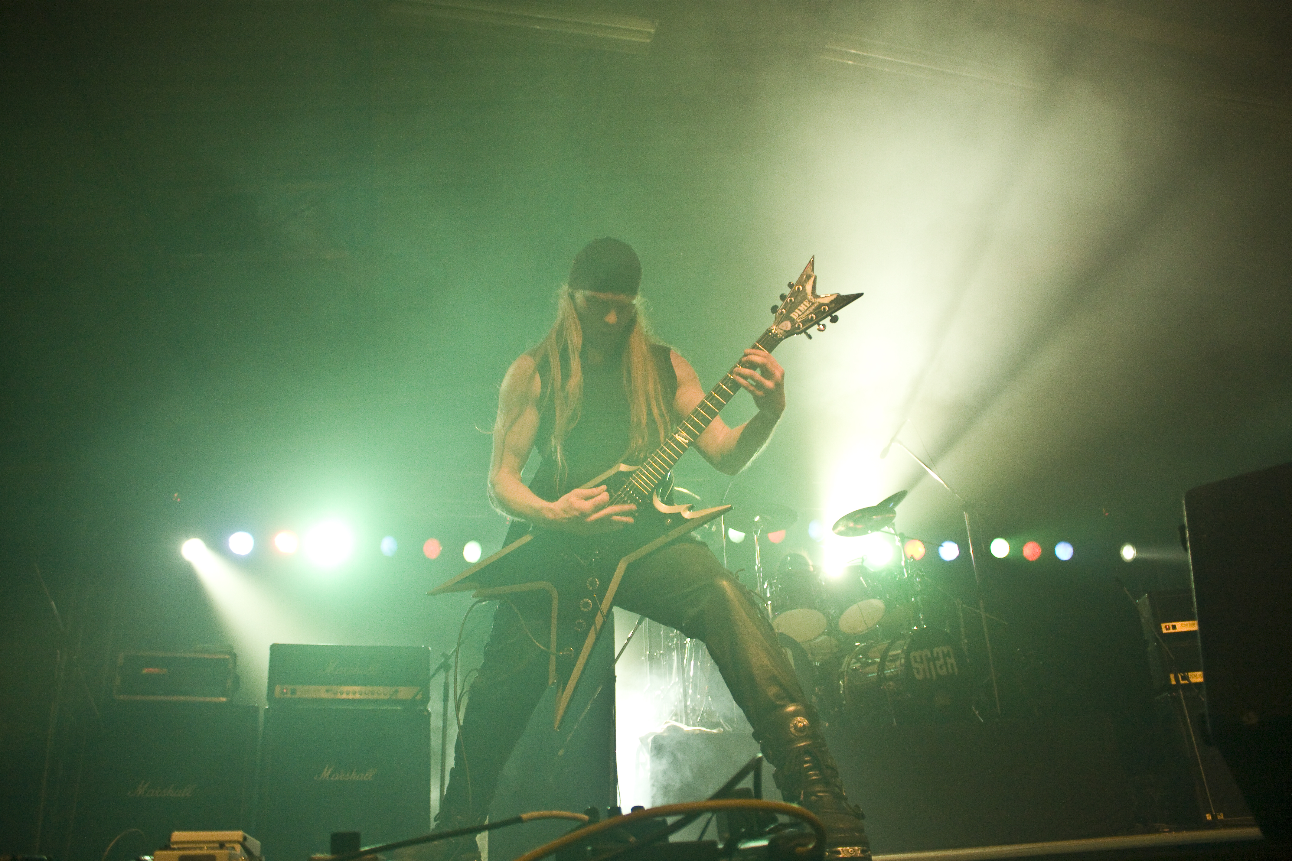 Concierto en El Salvador, Junio 2009.